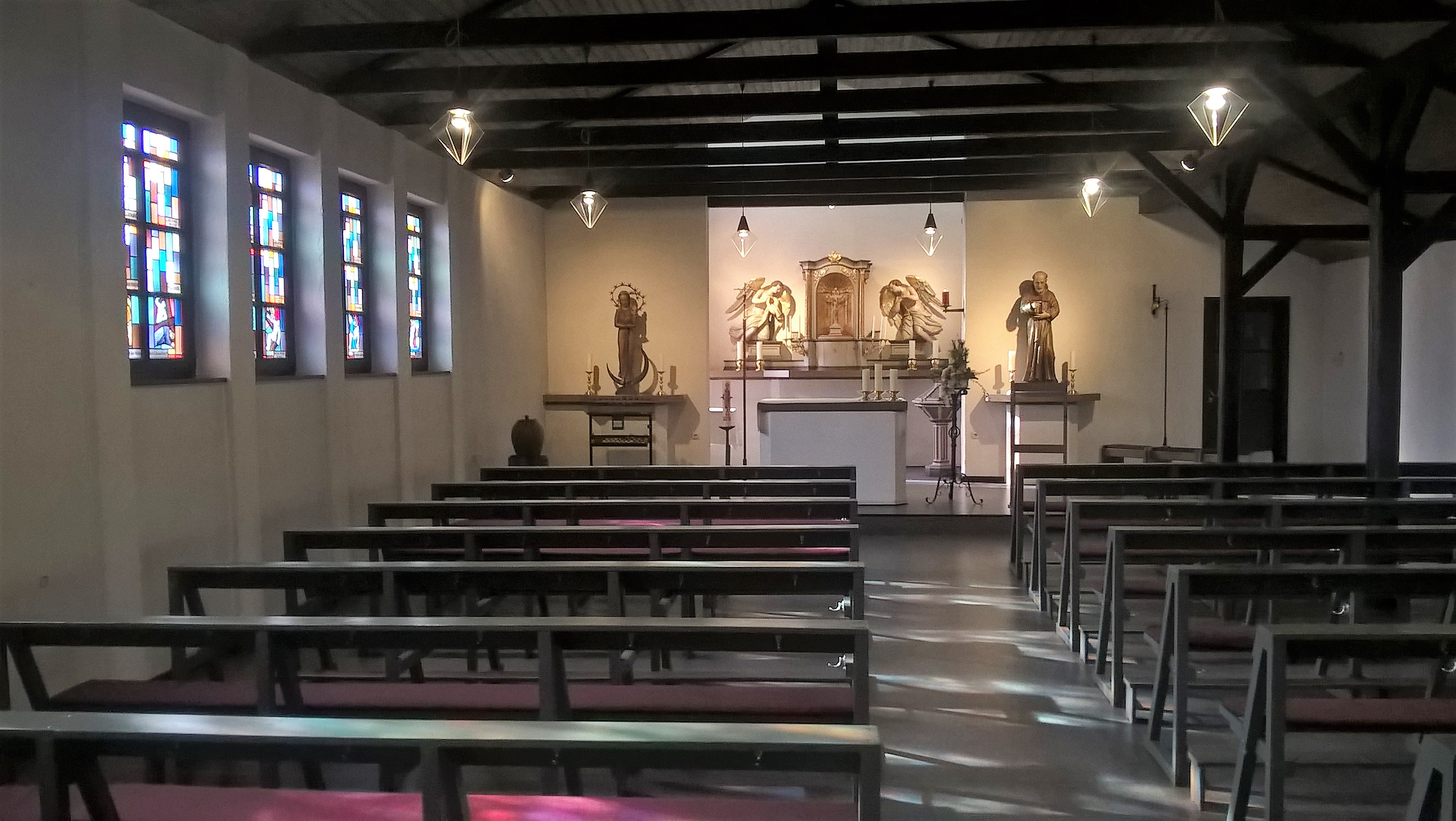 St. Maria Immaculata, Lich-Eberstadt, Landkreis Gießen, Hessen, Deutschland